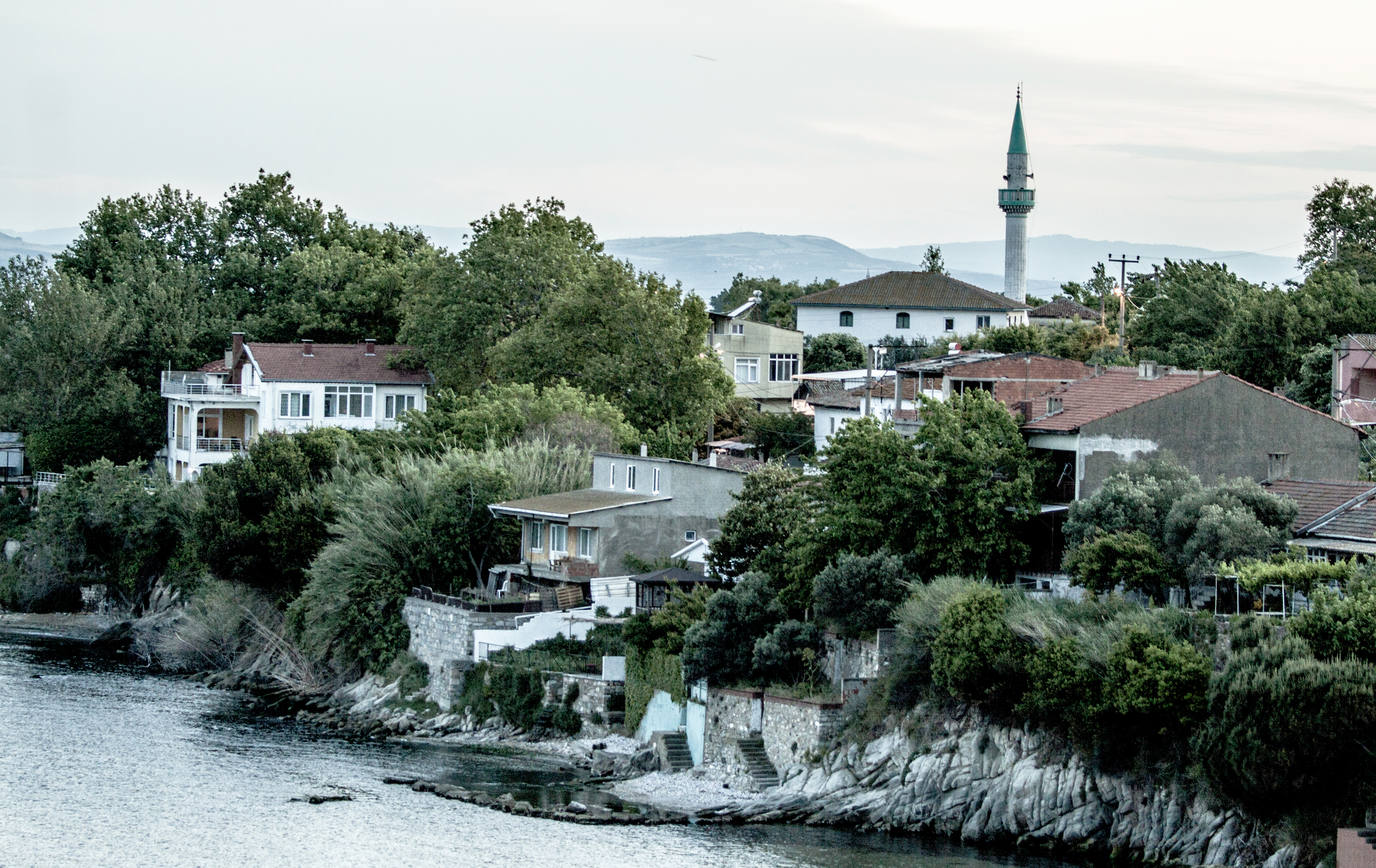 Aşağıyapı'nın görüntüsü